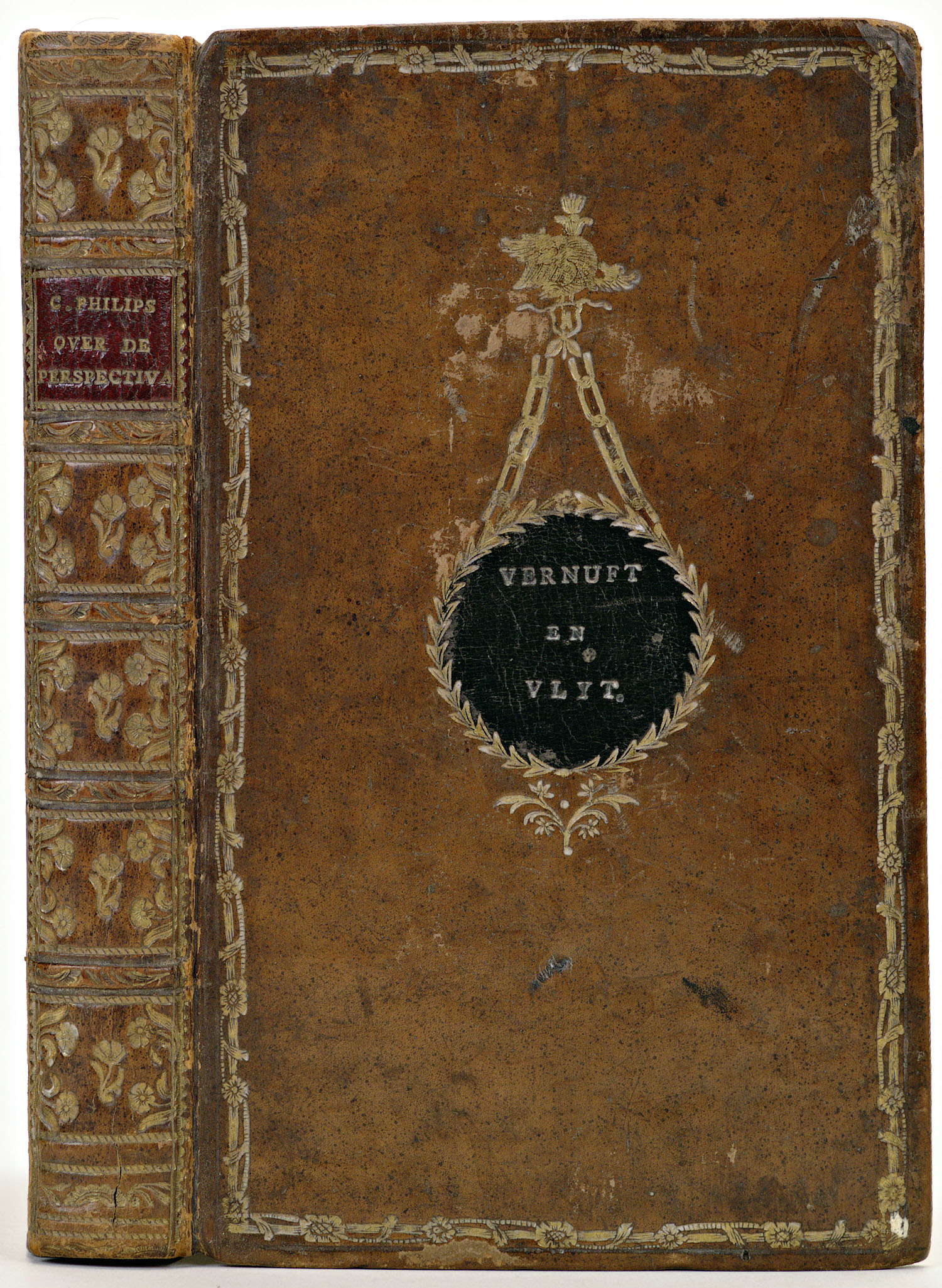 Inhoud: Caspar Philips Jacobsz. Uitvoerig onderwys in de perspectiva, of doorzichtkunde. Voor alle liefhebbers ... in 60 Konst-Plaaten afgehandeld door -. Tweede Druk. Te Amsterdam, By Jan Christiaan Sepp, 1781. 8vo.